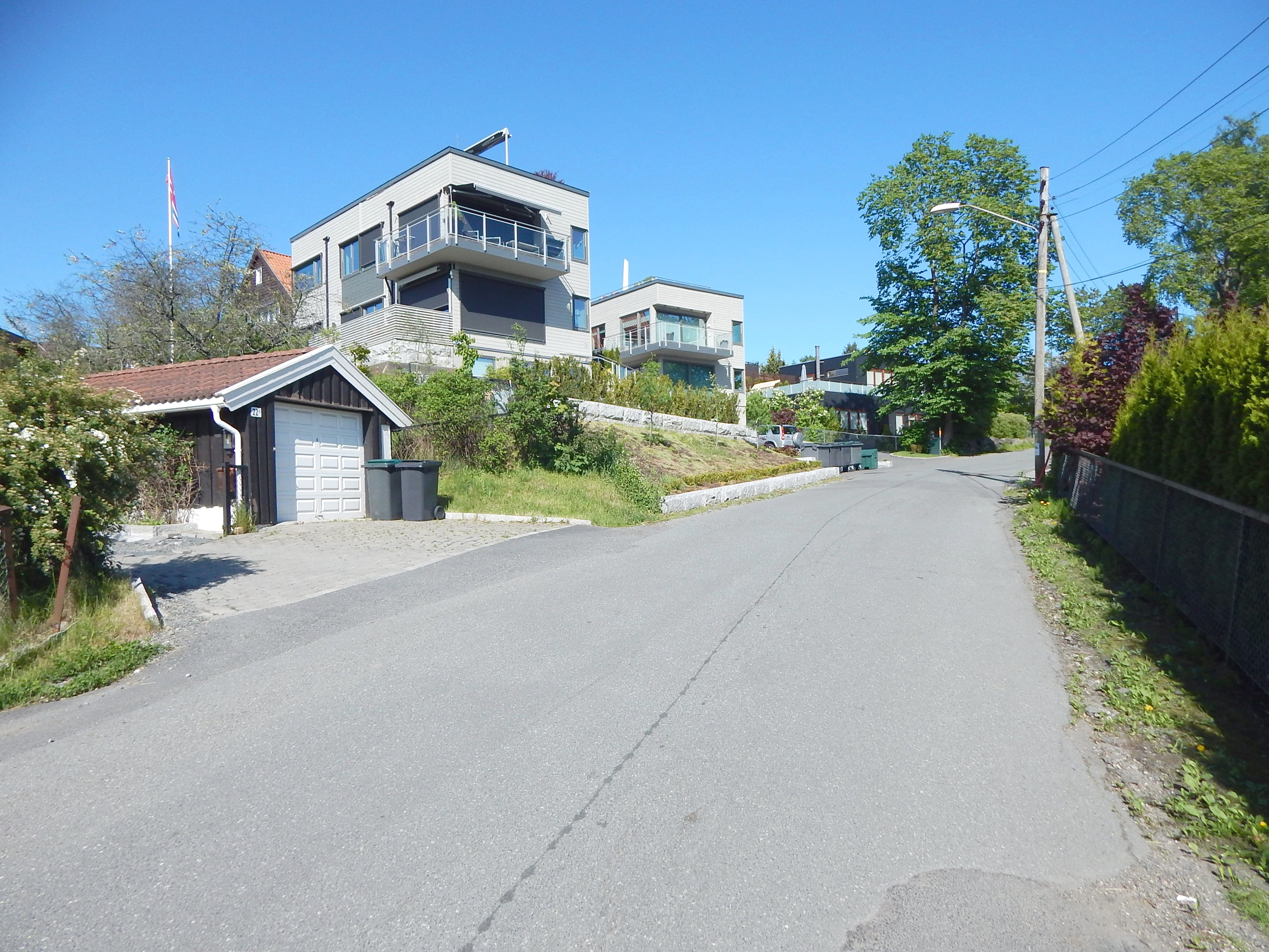 Bekkeliveien